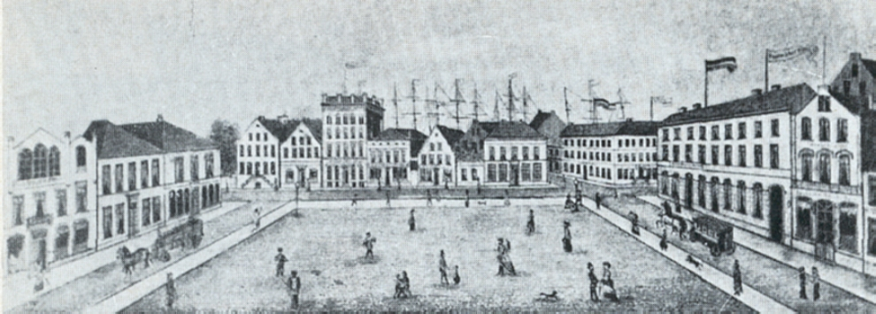 Blickrichtung nach Westen zum Alten Hafen